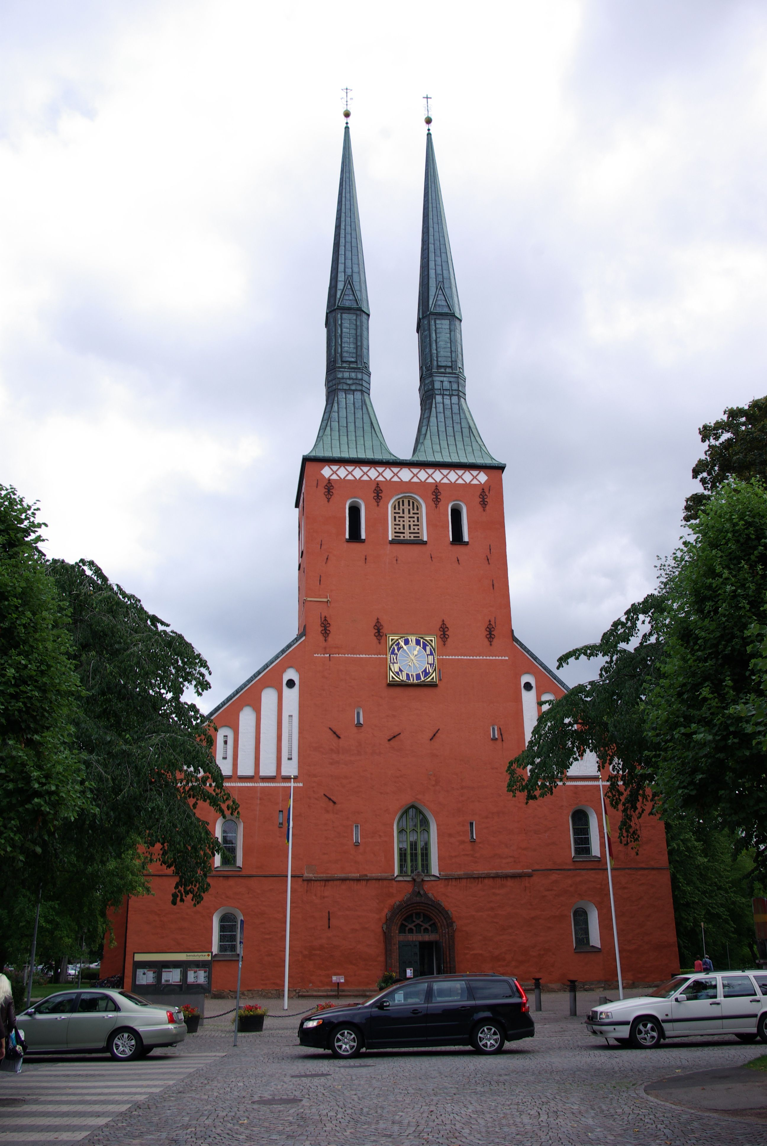 Växjö, Schweden, Frontanschicht des Domes (Geotags im EXIF-Daten)